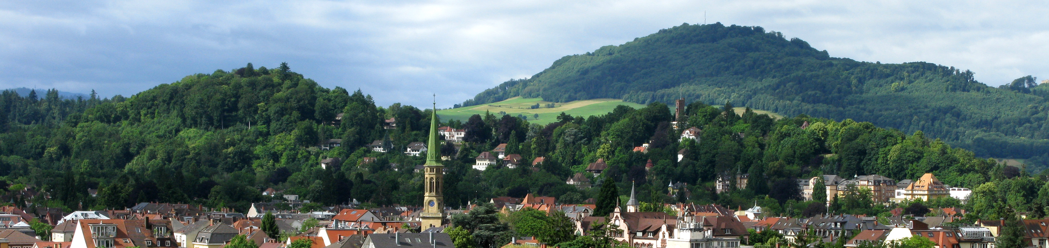 Lorettoberg vom Schlossberg gesehen